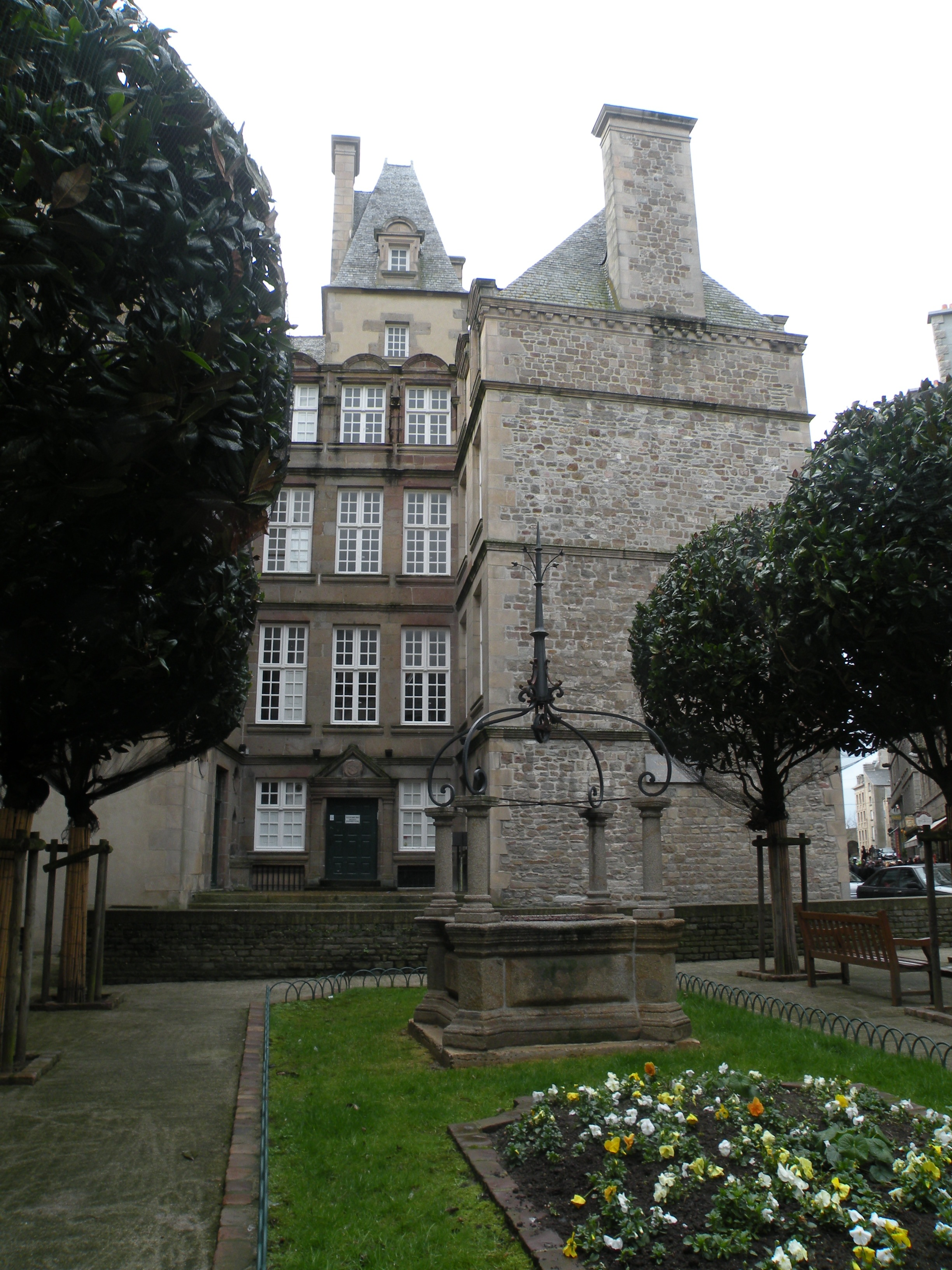 Hôtel André Désilles à Saint-Malo.